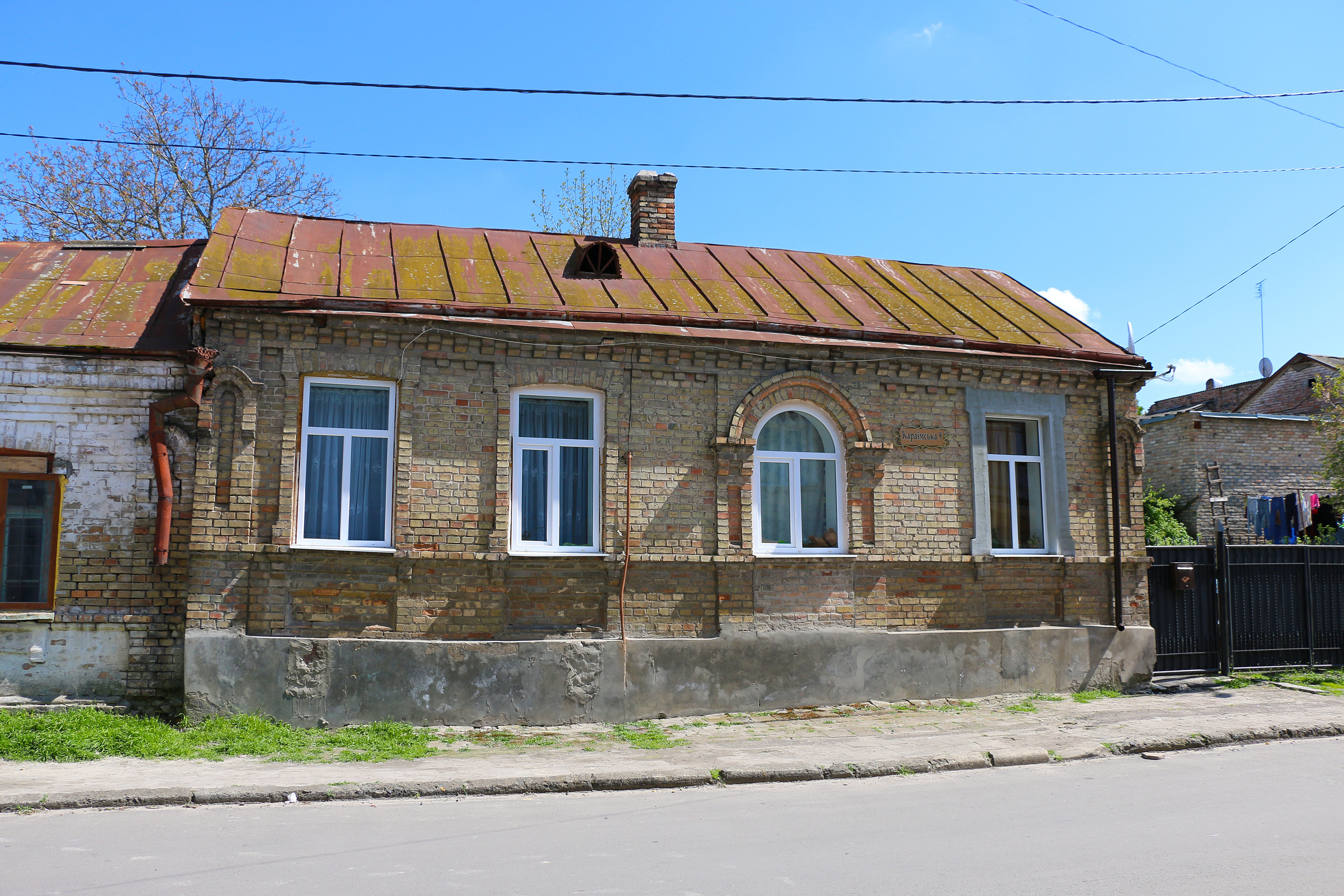 Житловий будинок (мур.), Луцьк, вул. Караїмська, 9